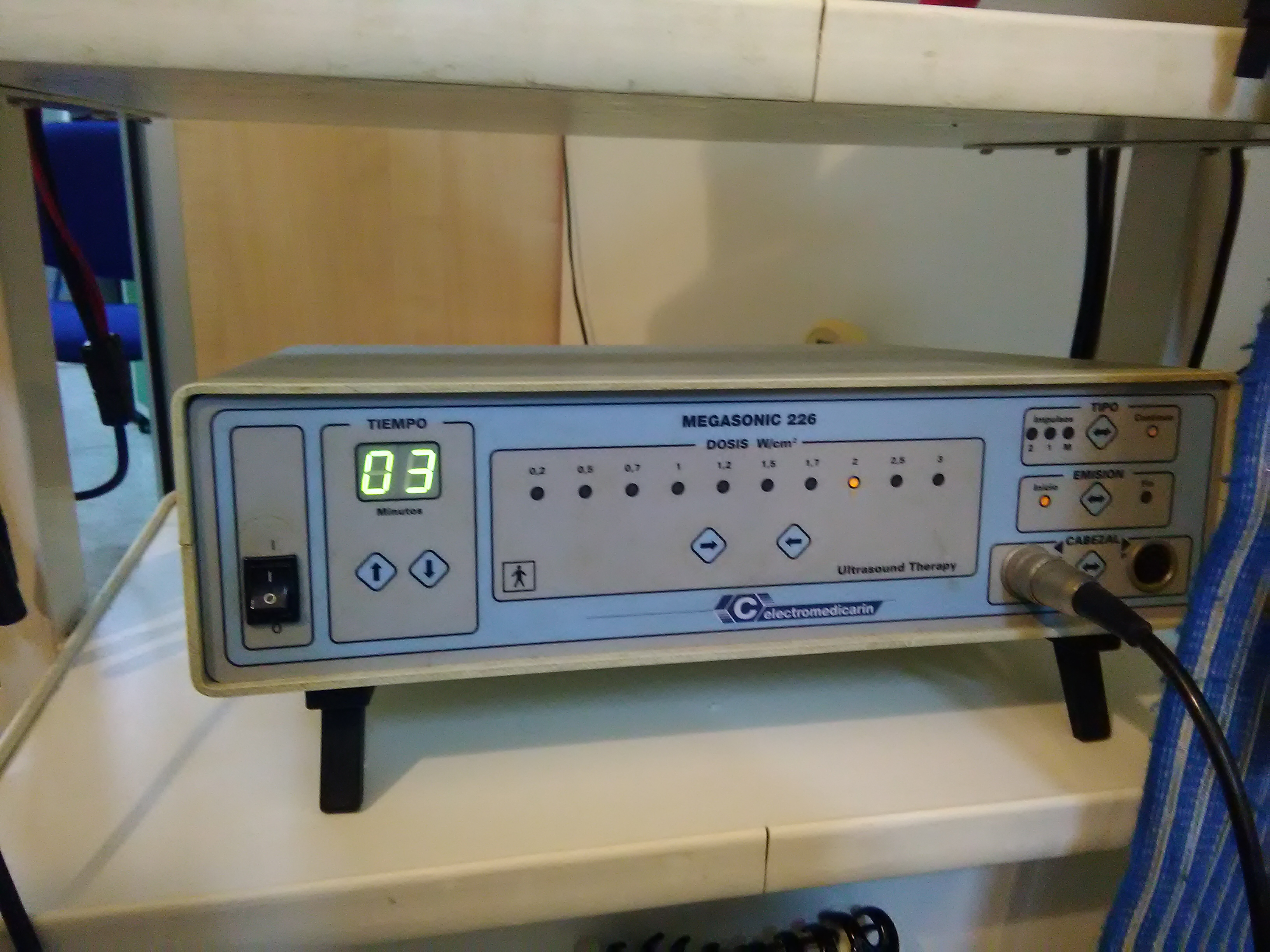 Ultrasoinu aparatua (Megasonic 226, Electromedicarin etxekoa) fisioterapia zentru batean